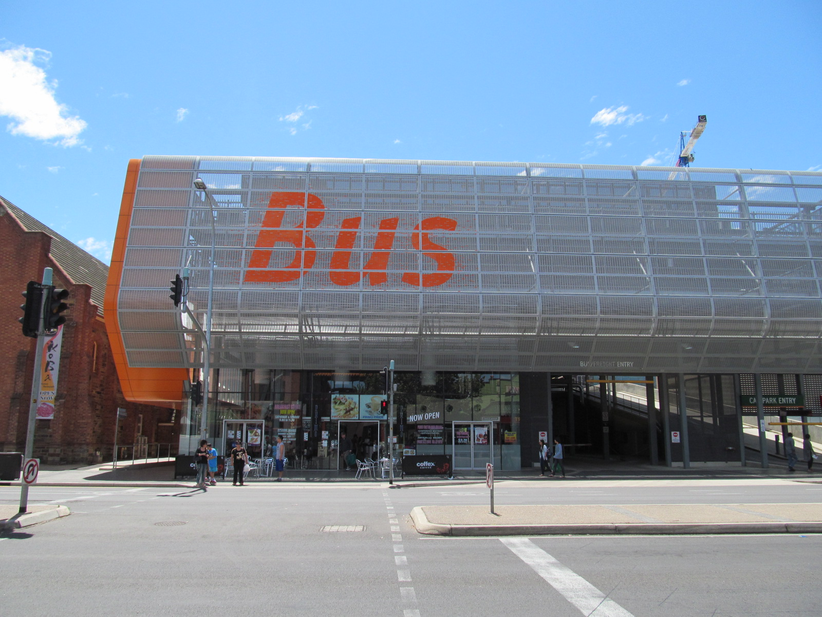 Adelaide Central Bus Station in Franklin Street, Adelaide.